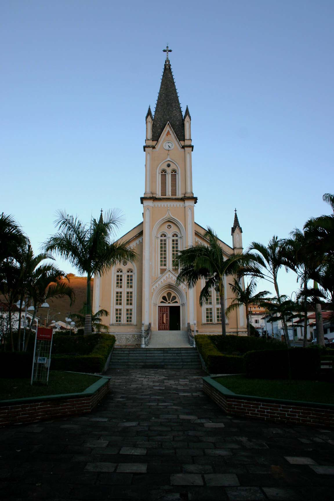 Foto da Igreda da cidade de Natércia